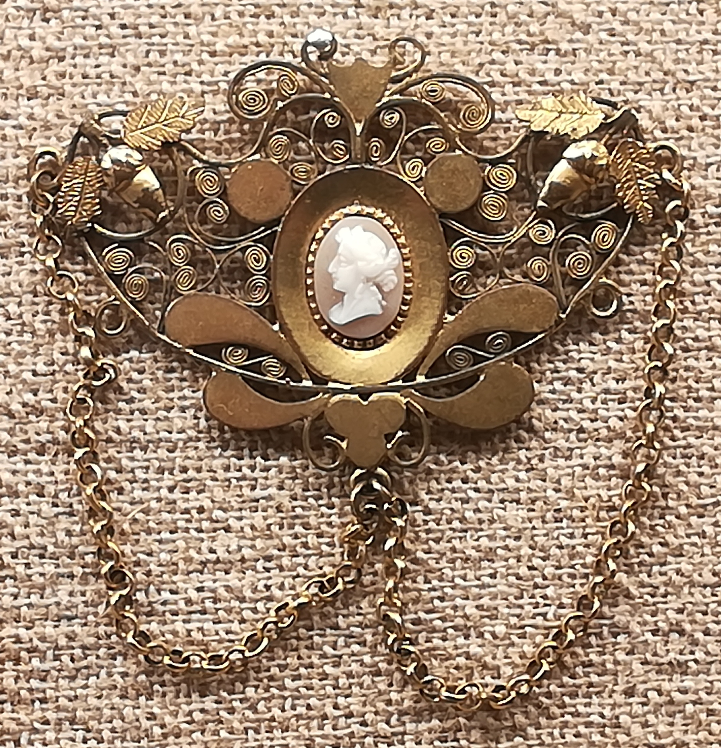 Schuwe, mehrteiliges Schmuckstück, Sammlung Irene Steiner